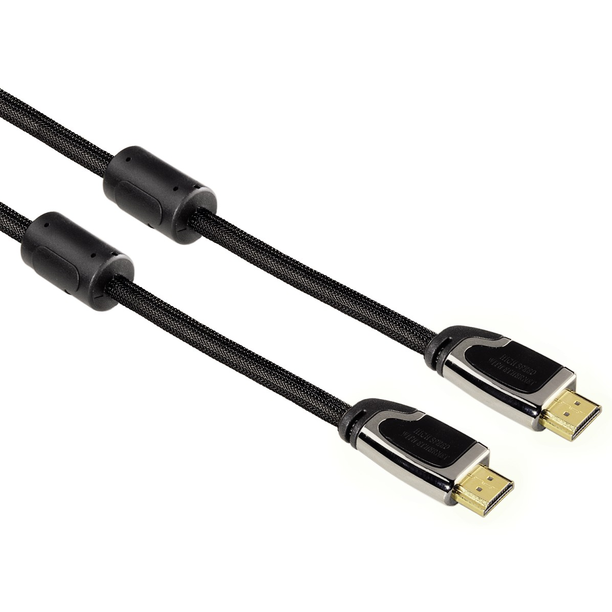 HDMI-Kabel